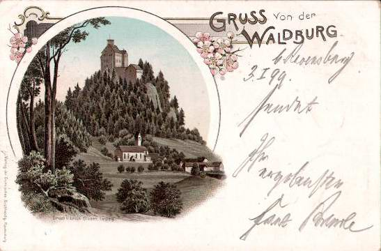 PD AK Waldburg von 1899